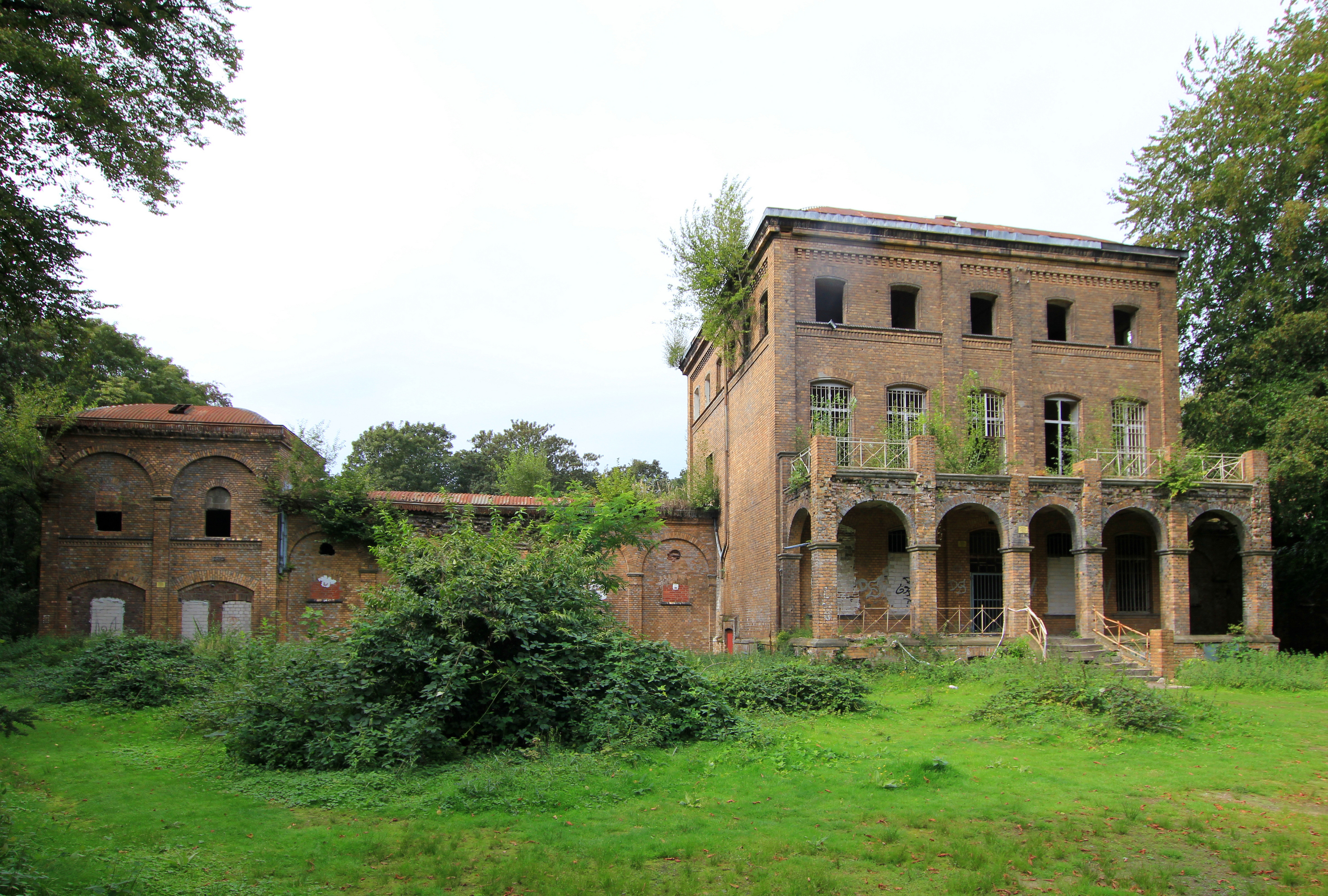 Köln-Fühlingen, Neusser Landstraße 5. Ehemaliger Landsitz der „von Oppenheim“ This is a photograph of an architectural monument.